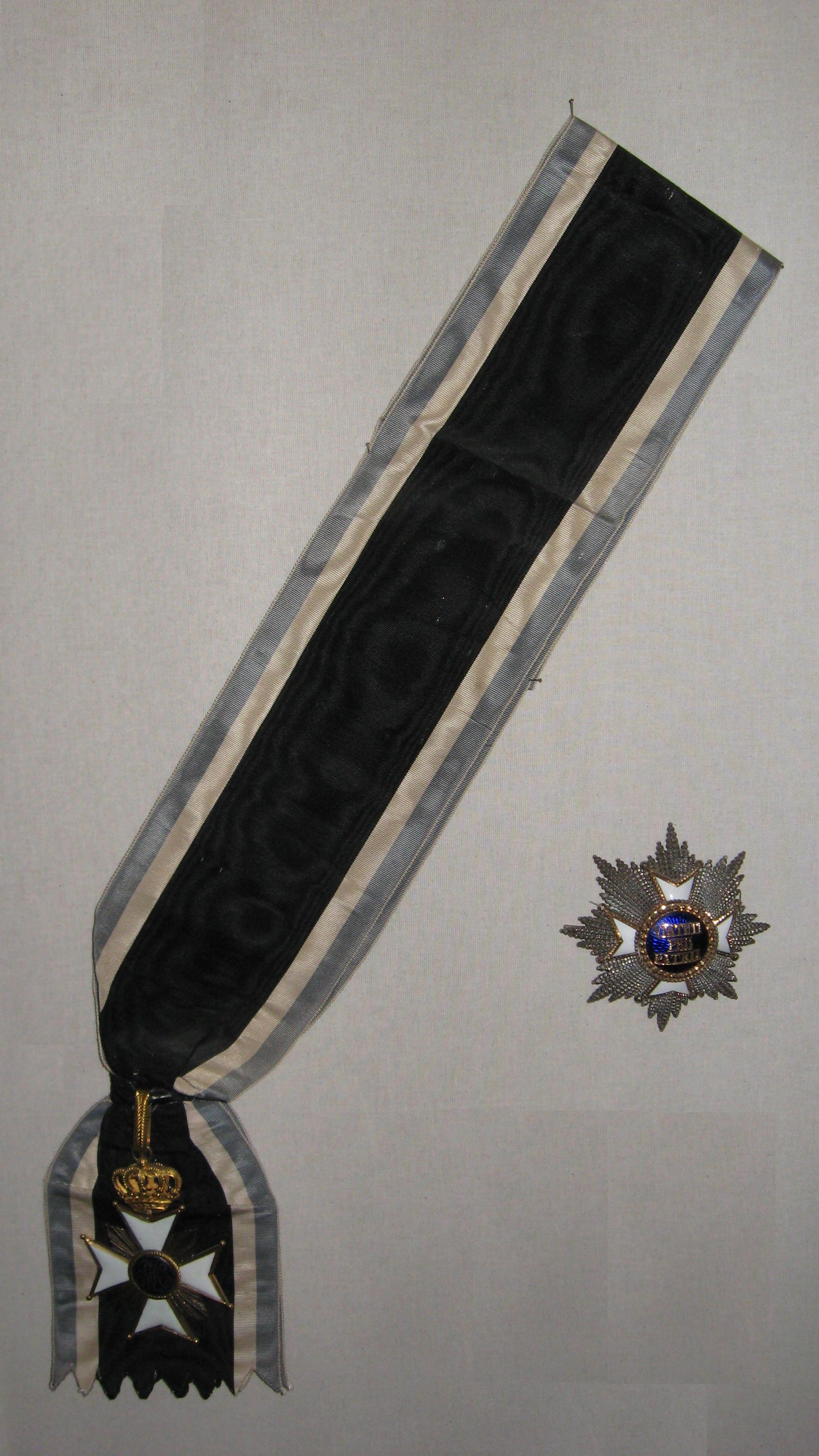 Militär-Max-Joseph-Orden: Großkreuz mit Stern, Schärpendekoration